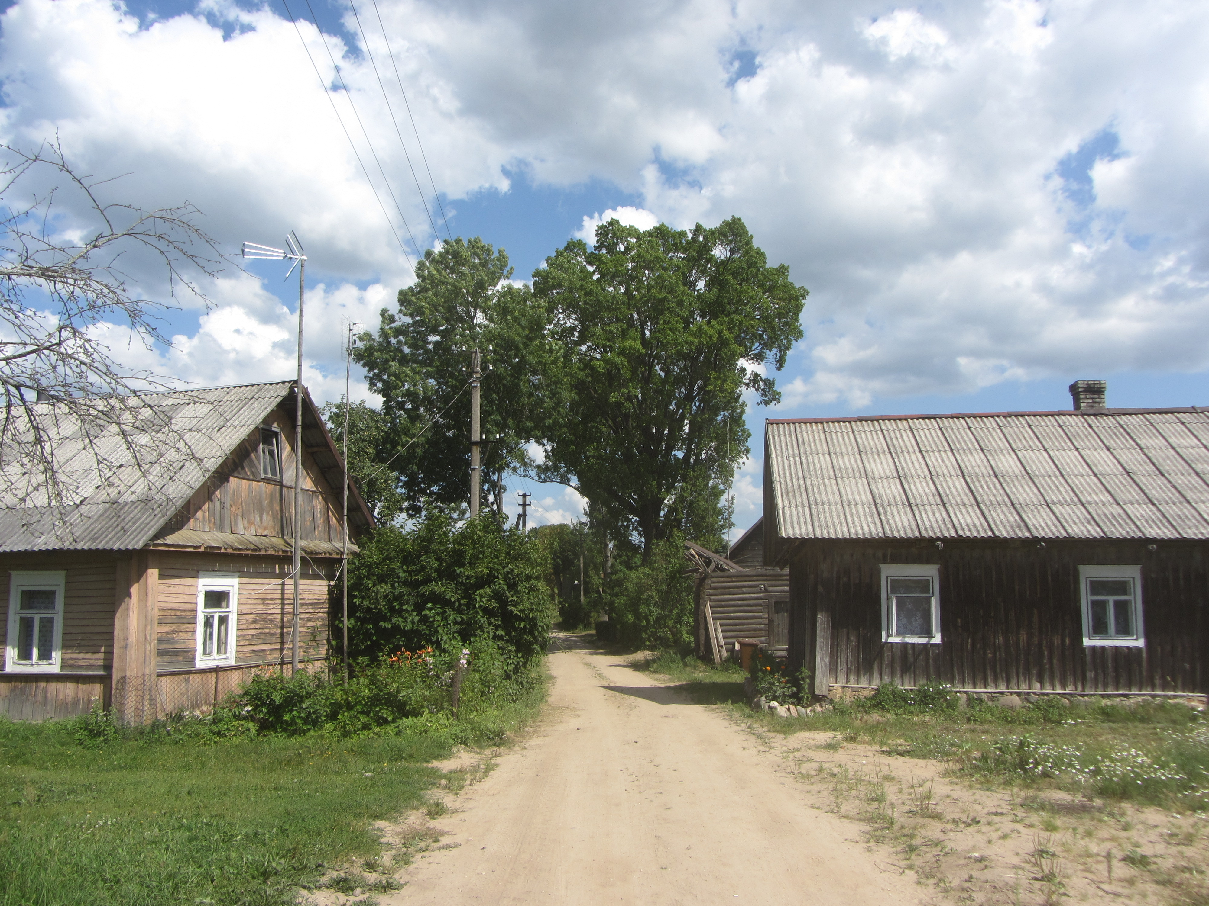 Modžiūnai, Lithuania